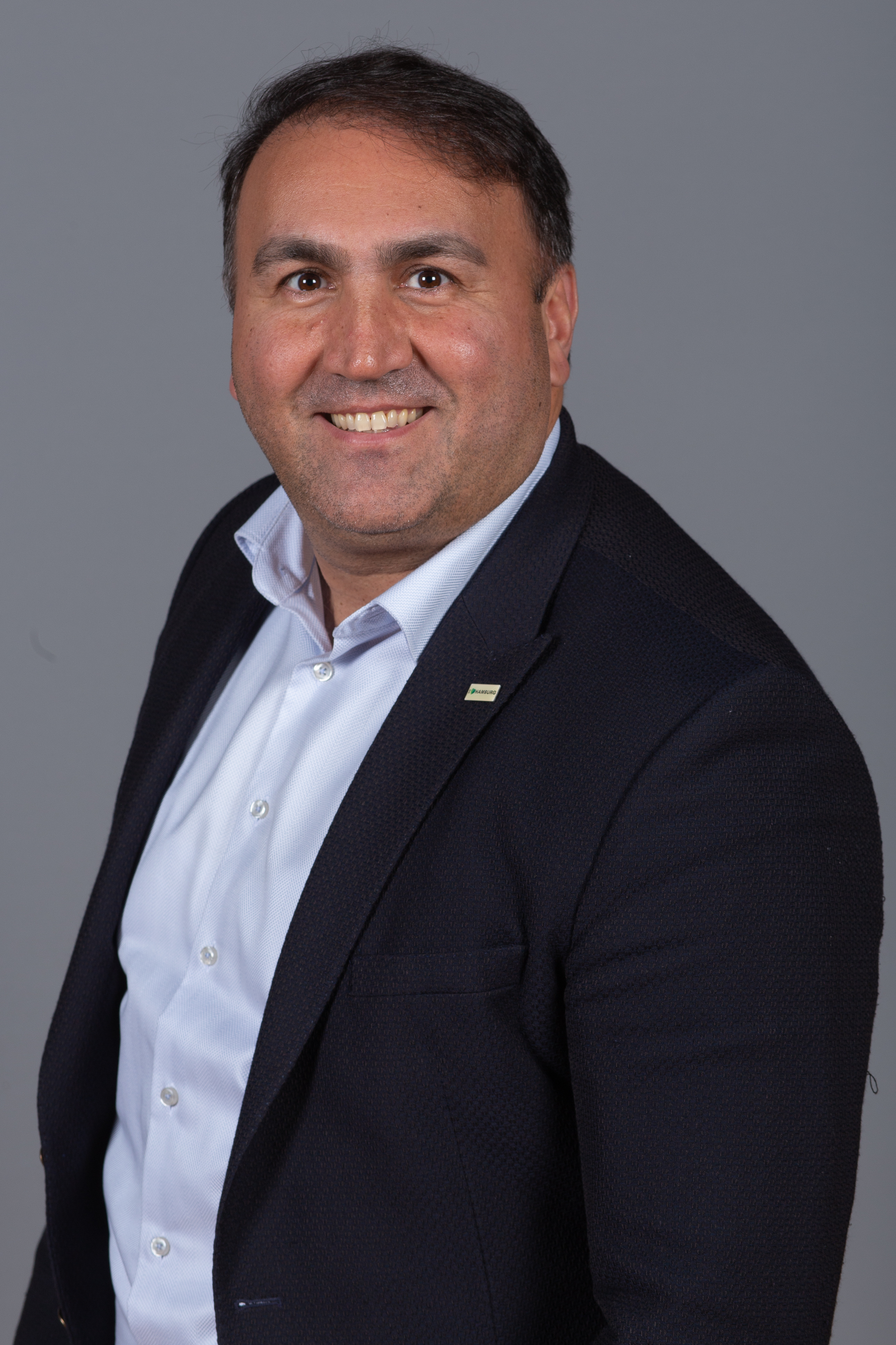 Abgeordnete(r) der Bürgerschaft der Freien und Hansestadt Hamburg Murat Gözay